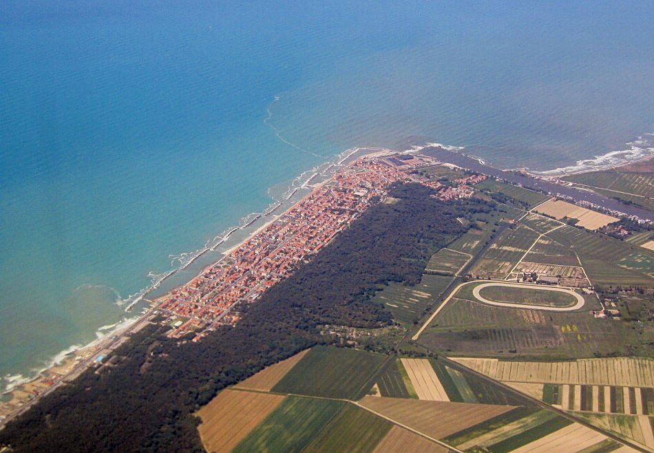 Panorama of Marina di Pisa, Pisa, Italy